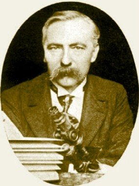 Narcisse Theophile Patouillard, mycologue et pharmacien français